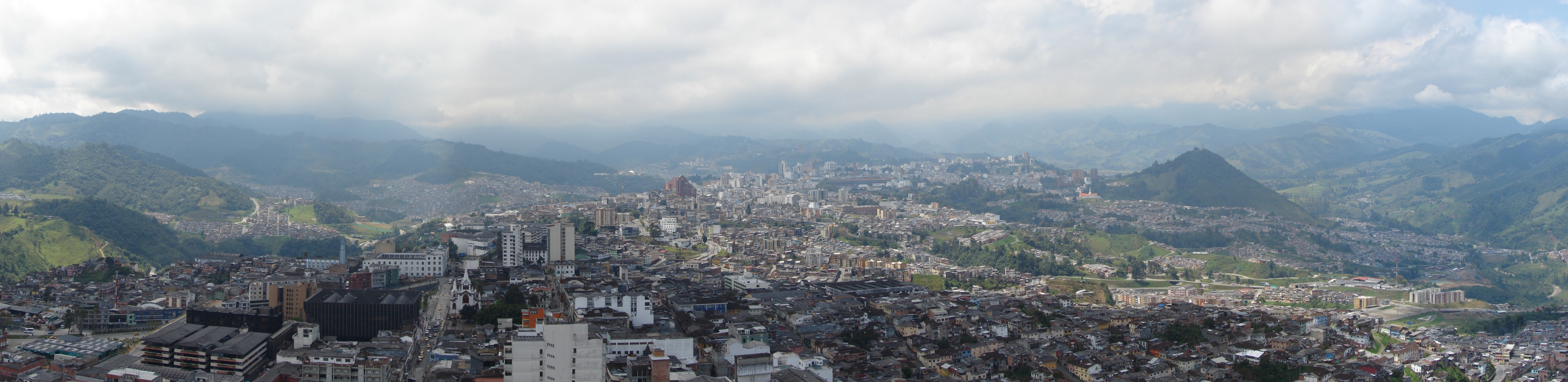 Vista de Manizales desde la catedral